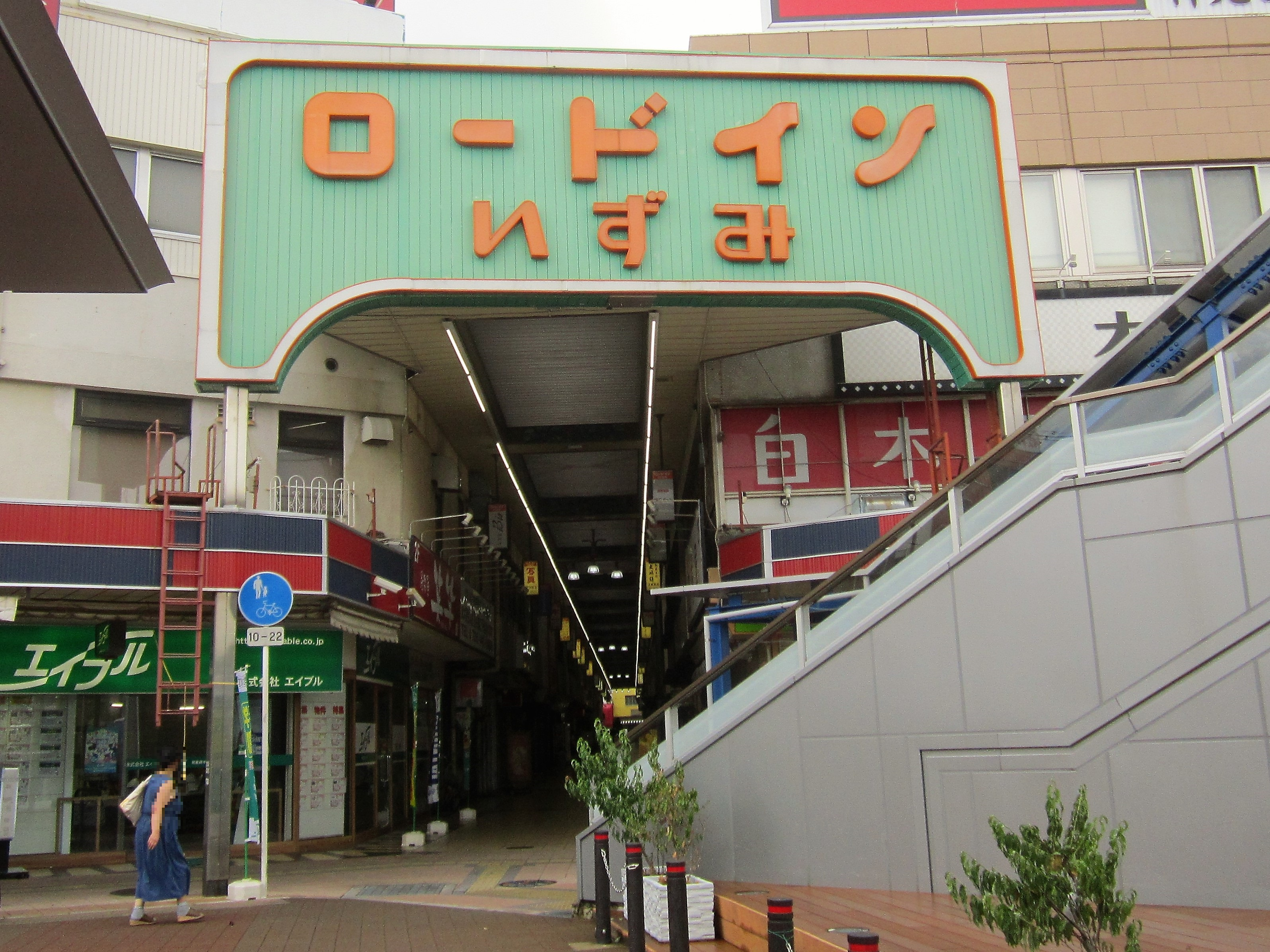 ロードインいずみ（和泉府中駅前）